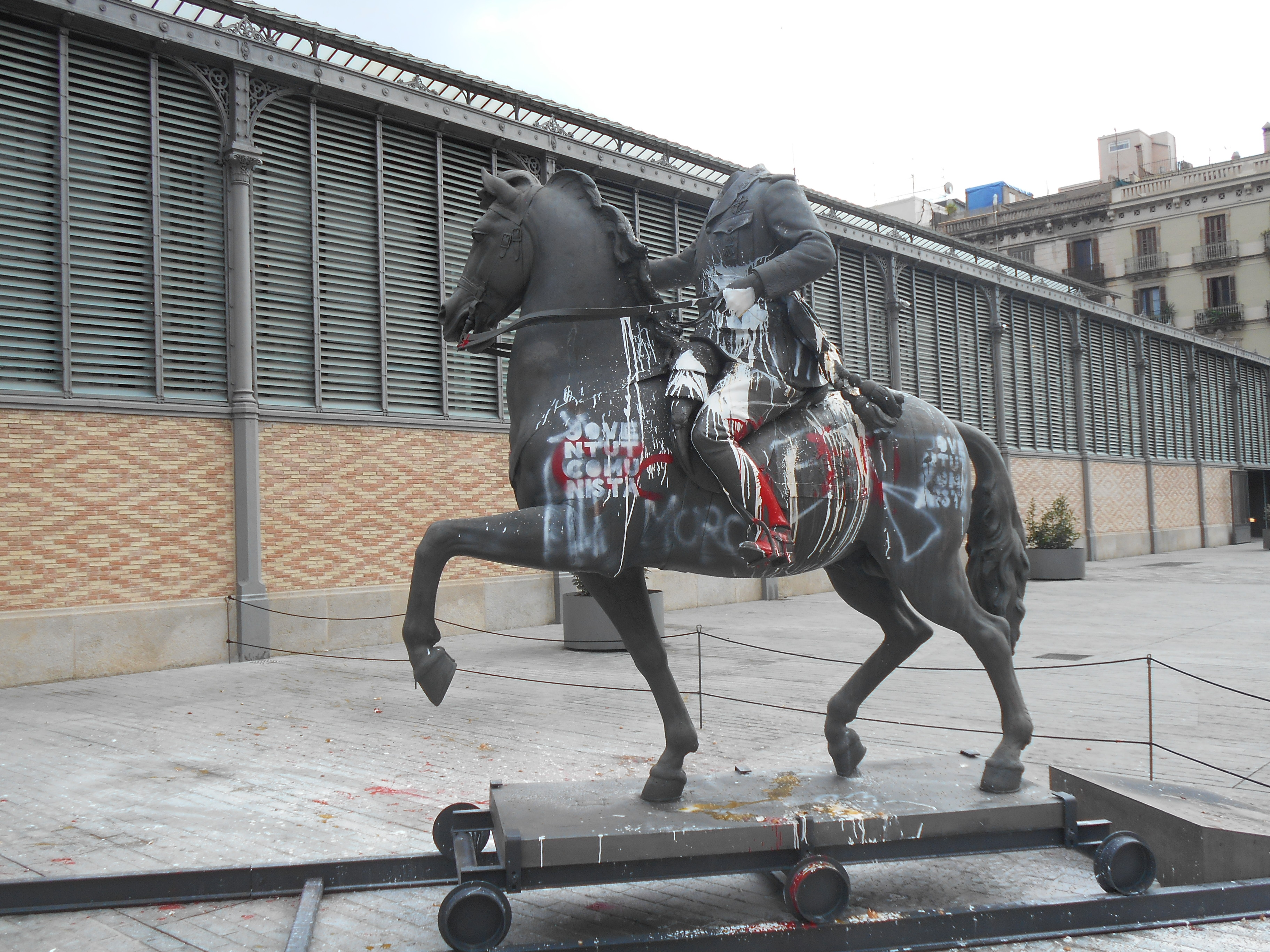 Al General Franco, de Josep Viladomat. Exposición Franco, Victoria, República. Impunidad y espacio urbano, Centro Cutural del Born, Barcelona, 19 de octubre de 2016.